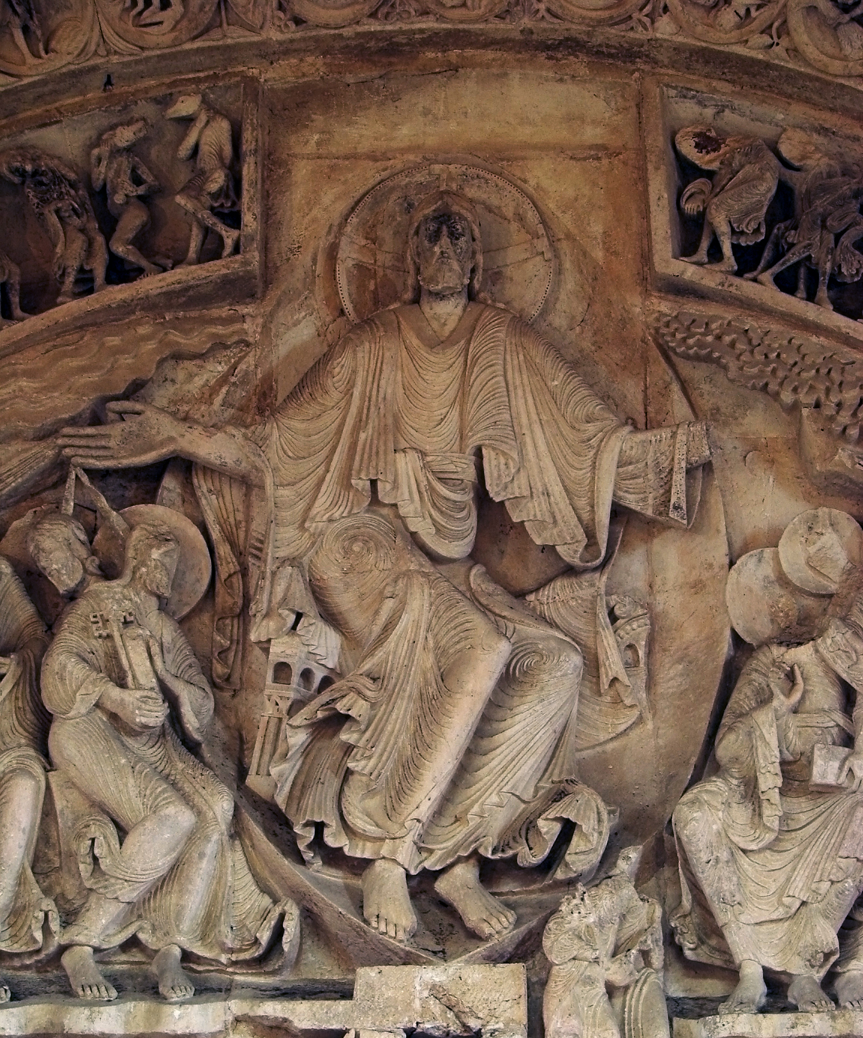 Le tympan central du narthex (sculpté vers 1125-1130),détail: le Christ en gloire. Basilique Sainte-Marie-Madeleine de Vézelay.